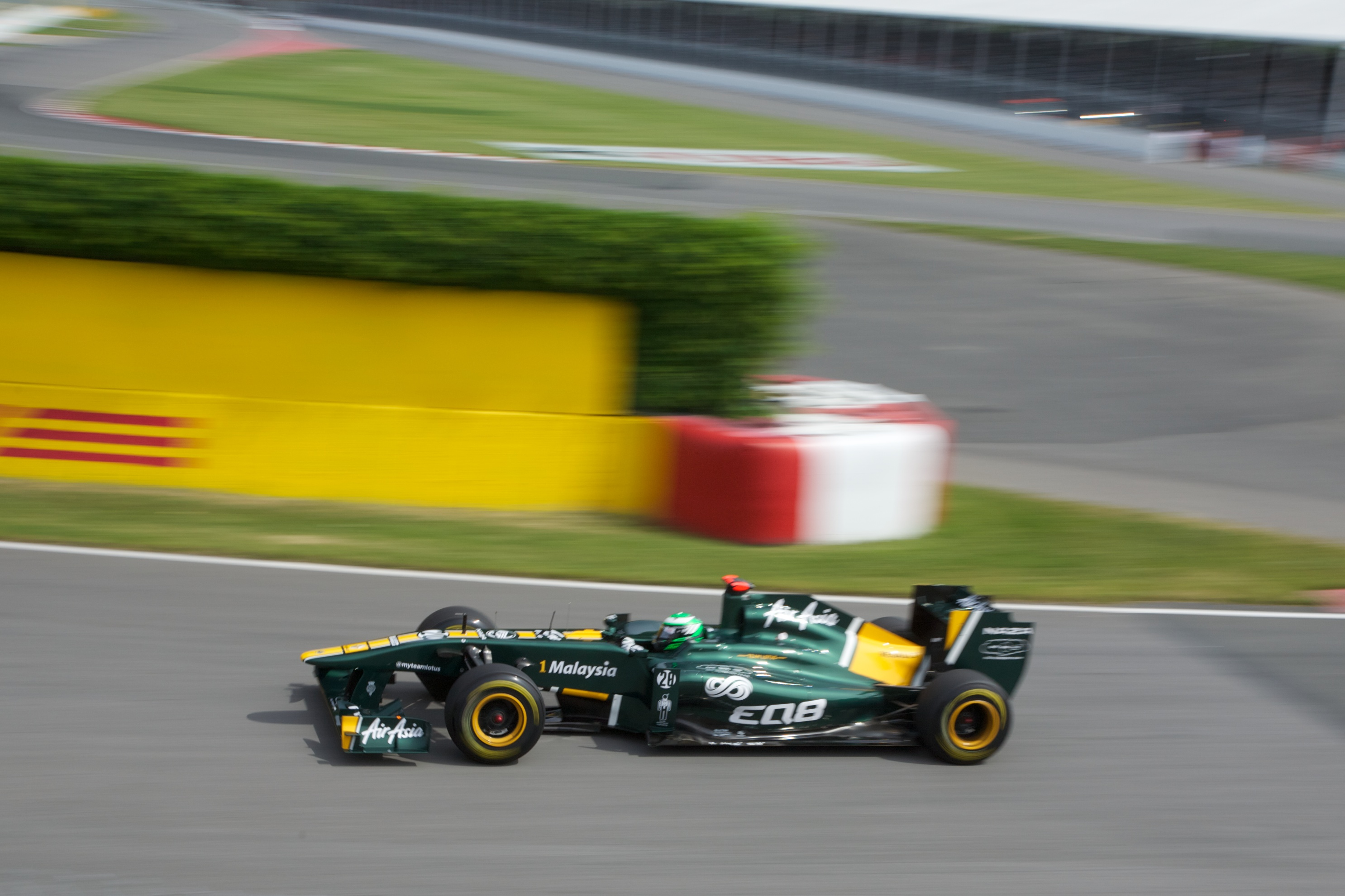 kovalainen au gp canada en 2011